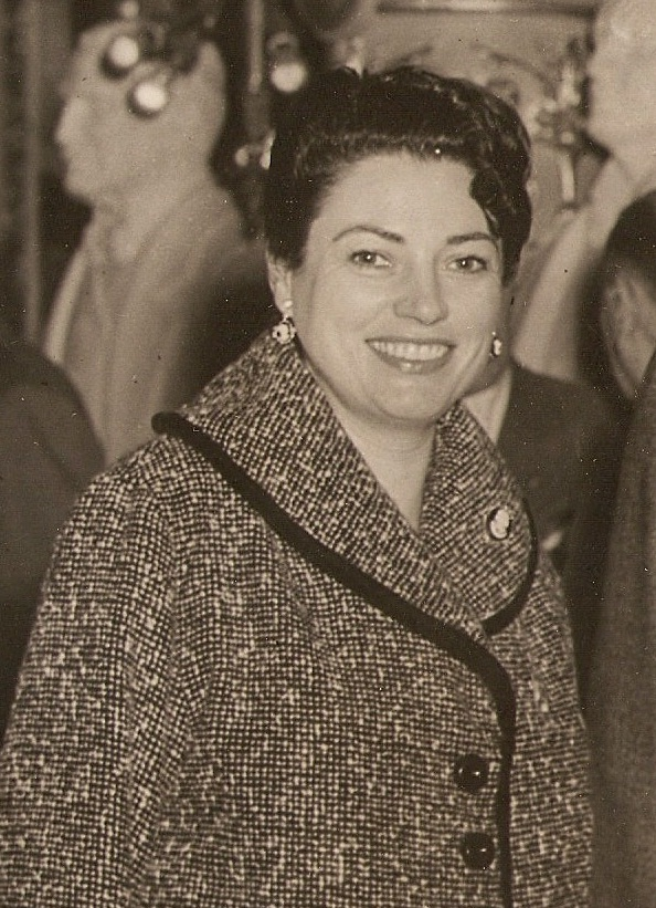 Foto de la Sra. Deglia Degliuomini de Parodi